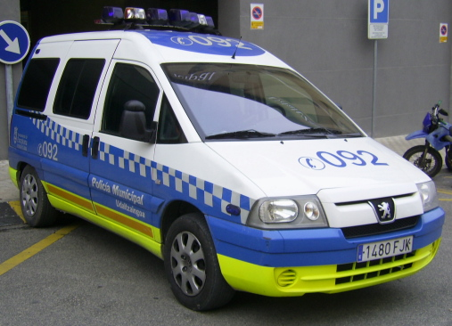 vehículo policía municipal pamplona 2007